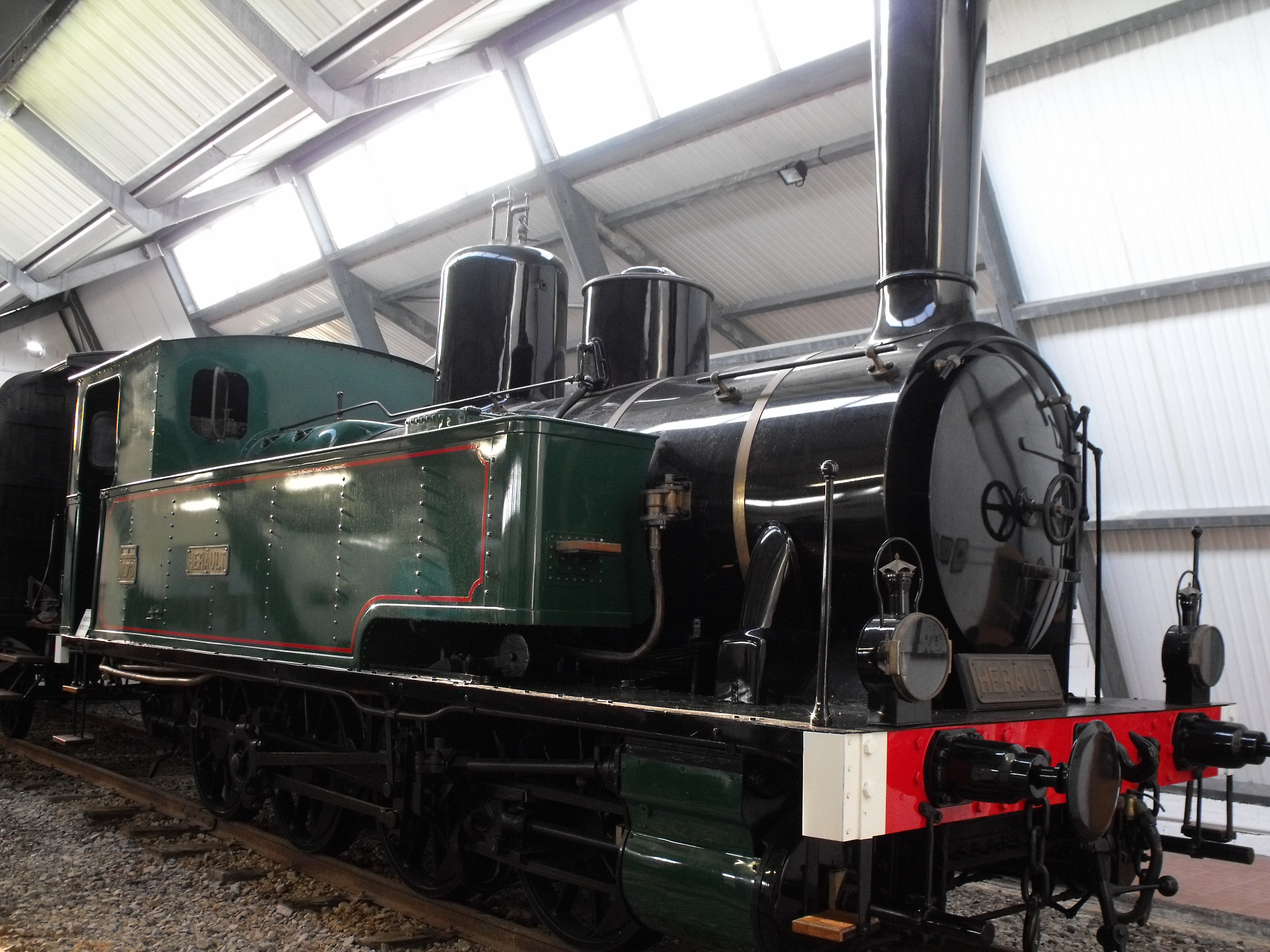 Locomotive du "petit train de palavas", musée du train, Palavas-les-flots, France